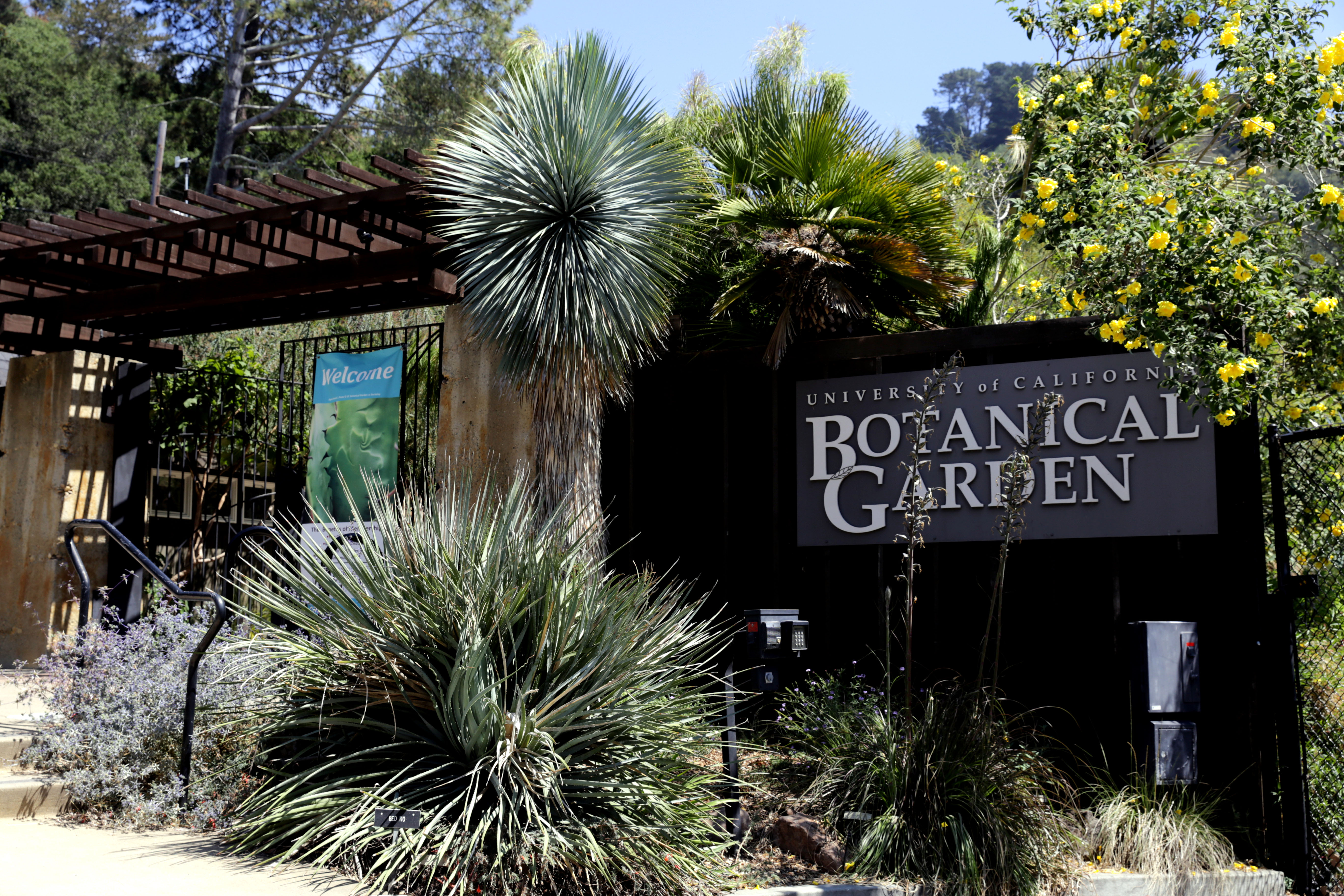 Eingangsbereich des Botanischen Gartens Berkeley in Querformat